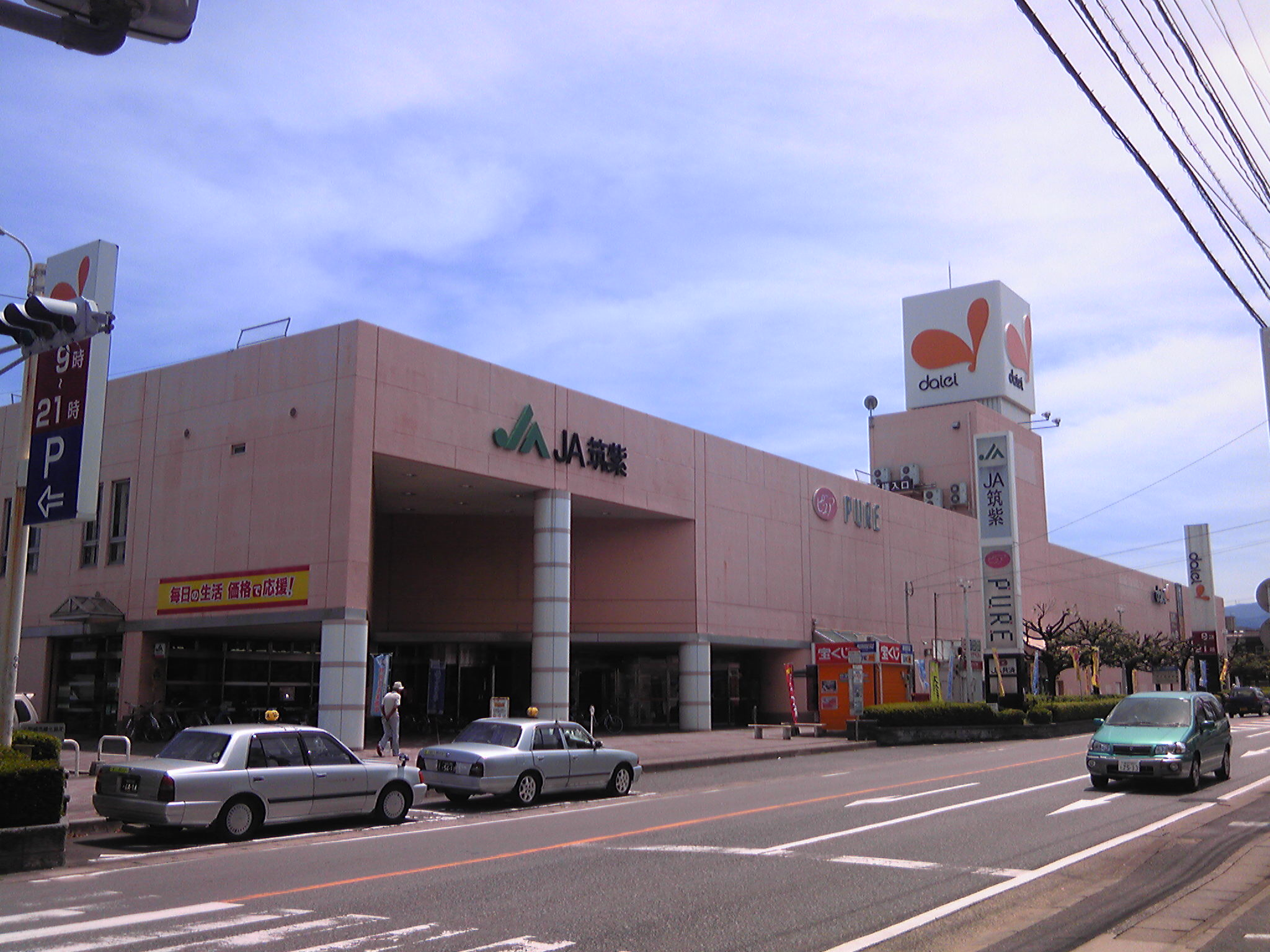 ダイエー下大利店（福岡県大野城市）